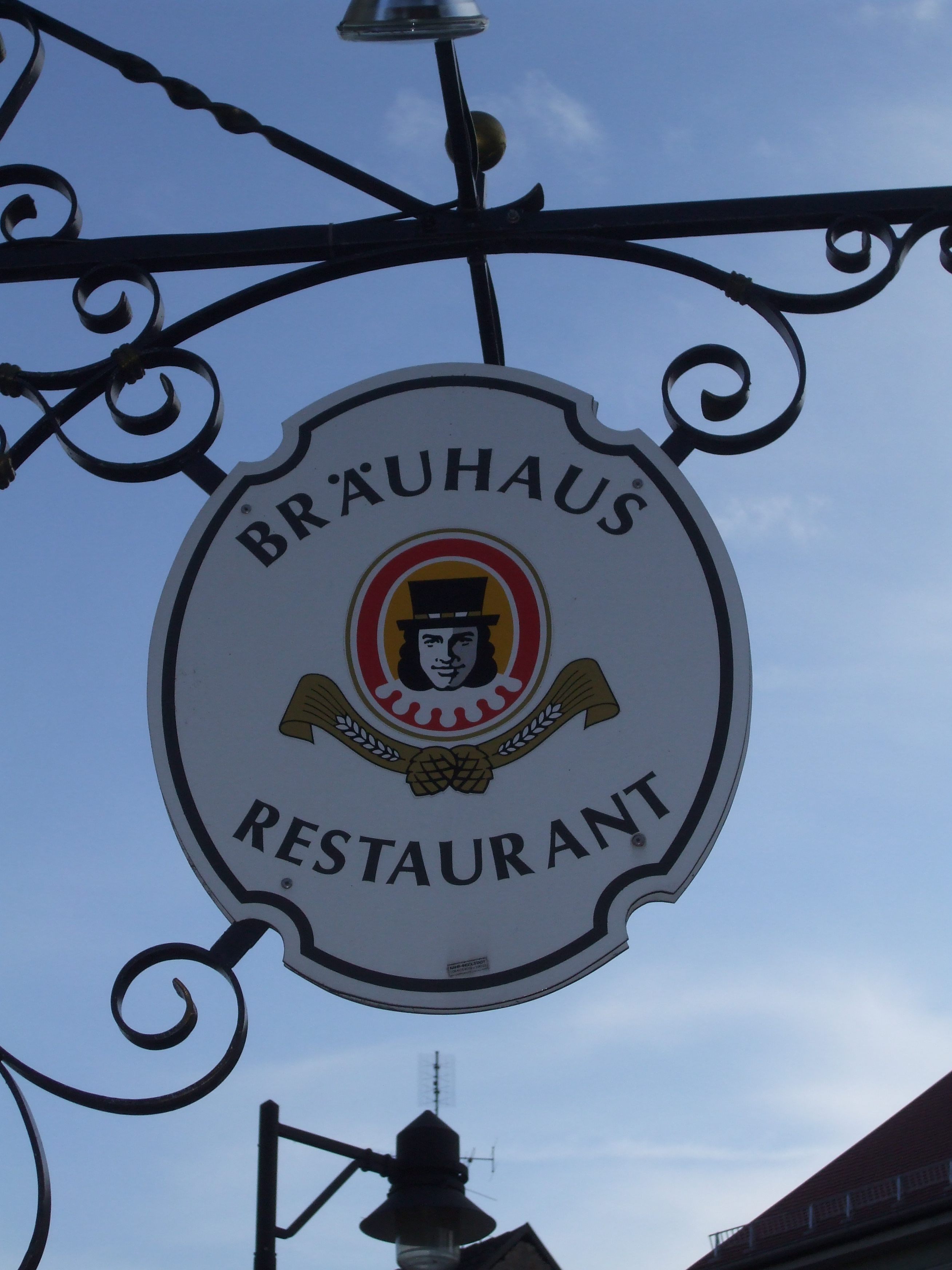 Ingobräu Schild